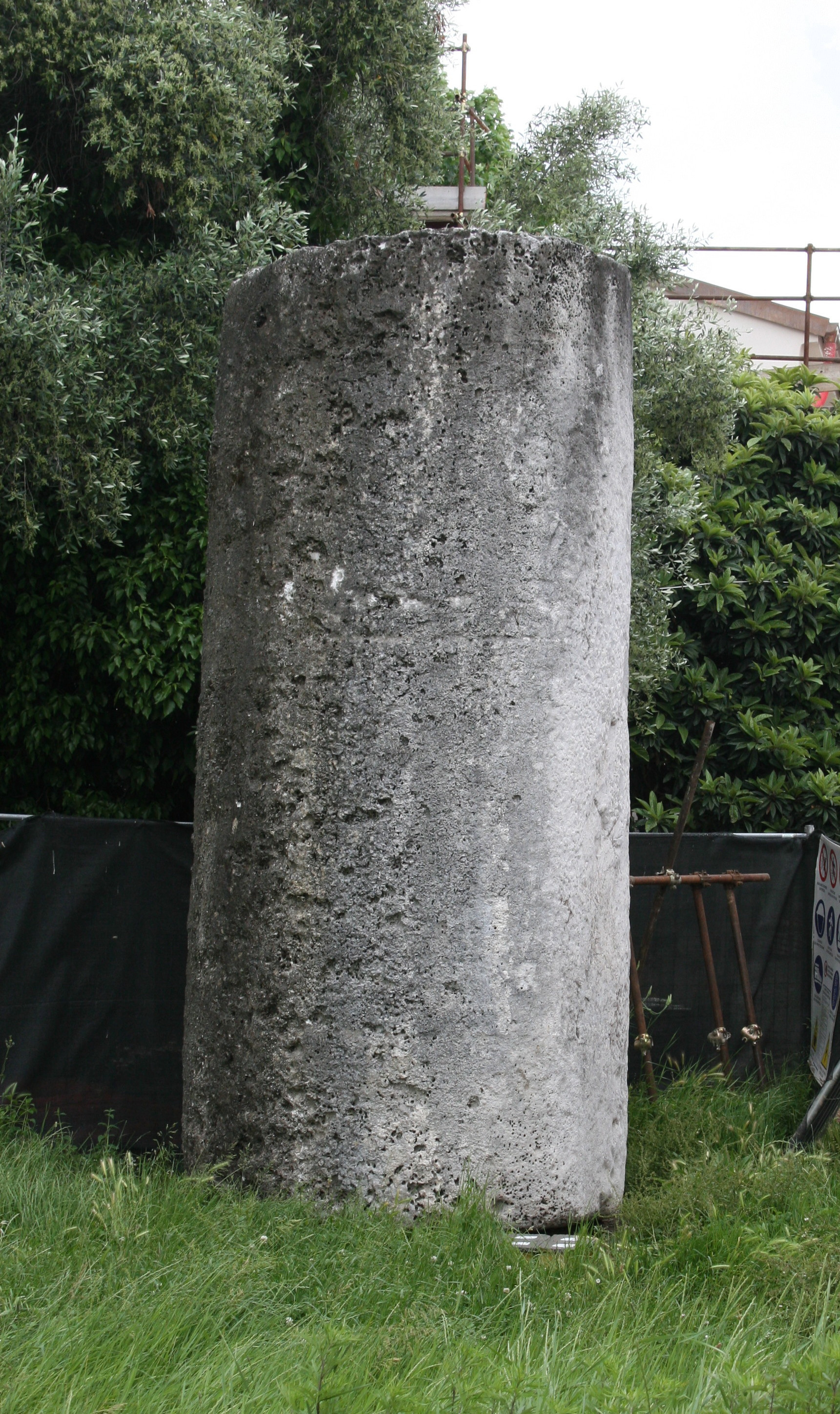 Luni, Säulenfragment auf dem Weg zum Museum